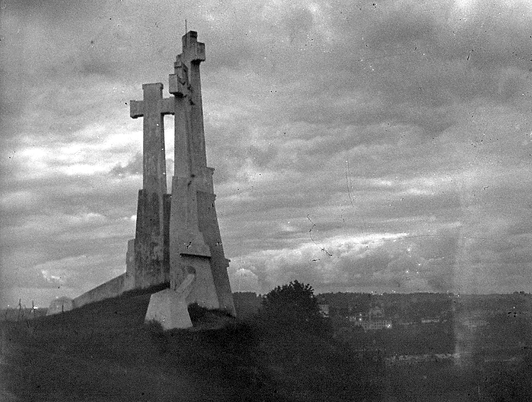 Trzy Krzyże w Wilnie, ok. 1930 r.